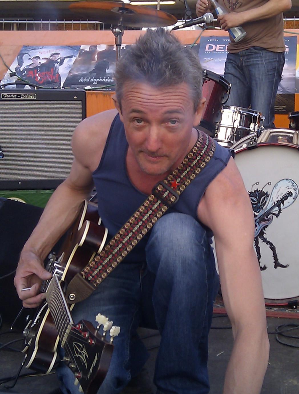 Timothy James Webb, Sänger der Silverflies, Viehhof-Kino München, 13. Juli 2013